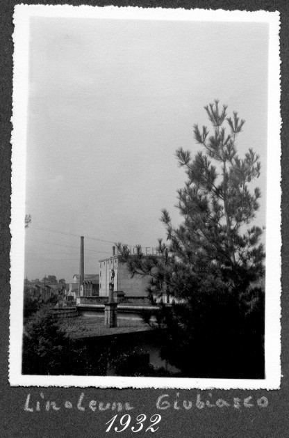 Linoleum site in Giubiasco, Switzerland, 1932